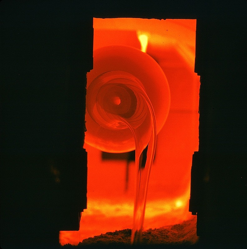 Original image description from the Deutsche Fotothek Facharbeiter für Glastechnik